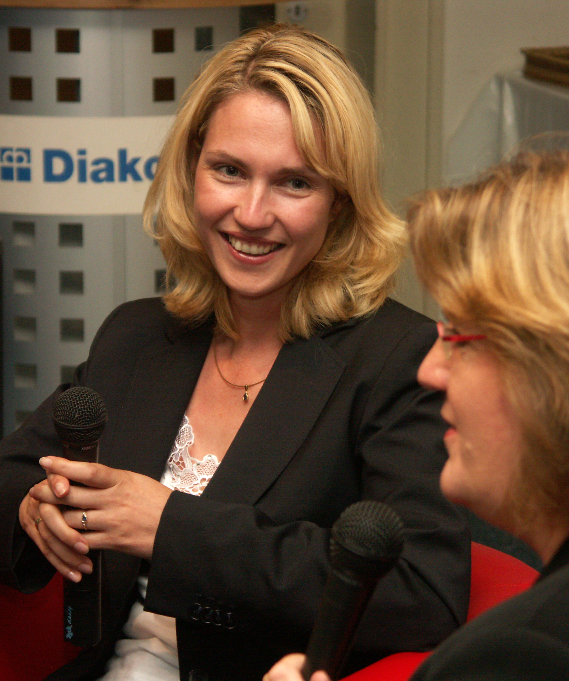 Manuela Schwesig, Sozialministerin des Landes Mecklenburg-Vorpommern, im Gespräch mit Kerstin Griese, Familienausschussvorsitzende des Bundestages (in den Räumen der Diakonie Velbert)